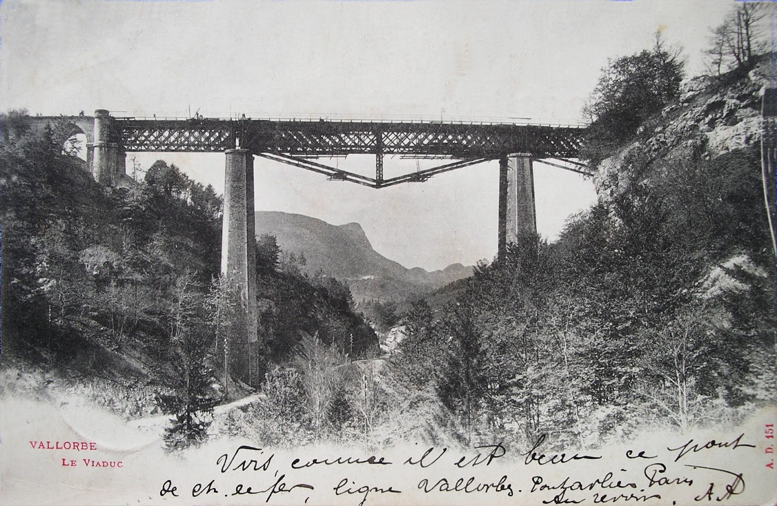 Viadukt von Le Day